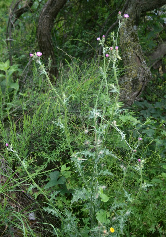 Carduus pycnocephalus, Korbblütler (Asteraceae) - Italien/Italia/Italy: Friuli-Venezia Giulia, Prov. Trieste, Sistiana, Rilkeweg/Sentiero Rilke